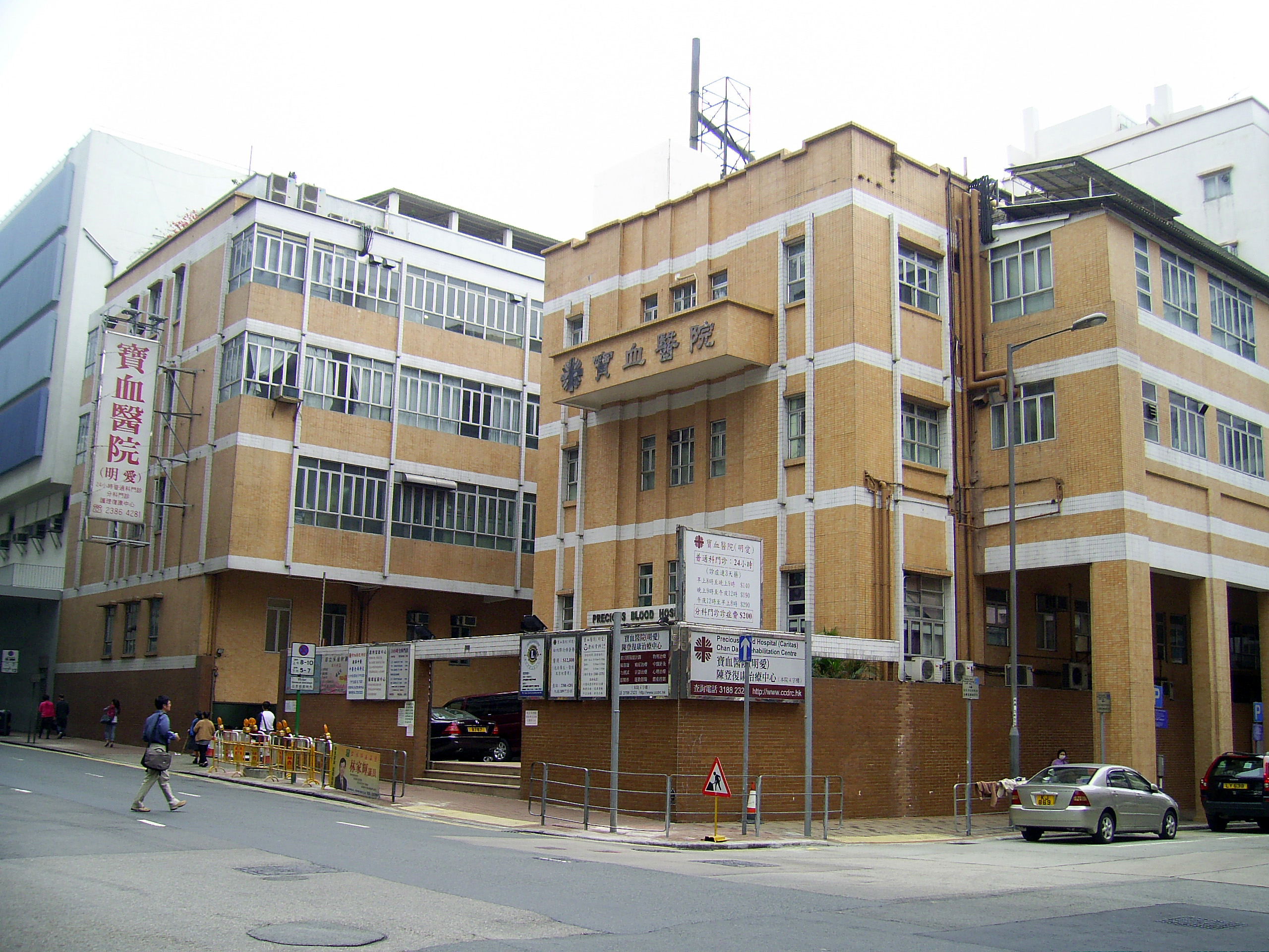 中文（香港）: 寶血醫院